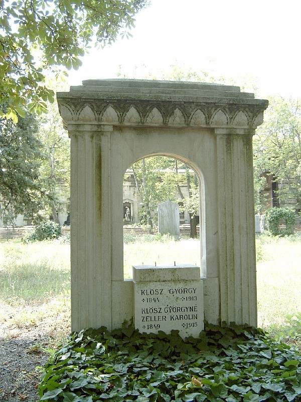 Klösz Györgynek és feleségének sírja Budapesten, Kerepesi temető: 18-1-37